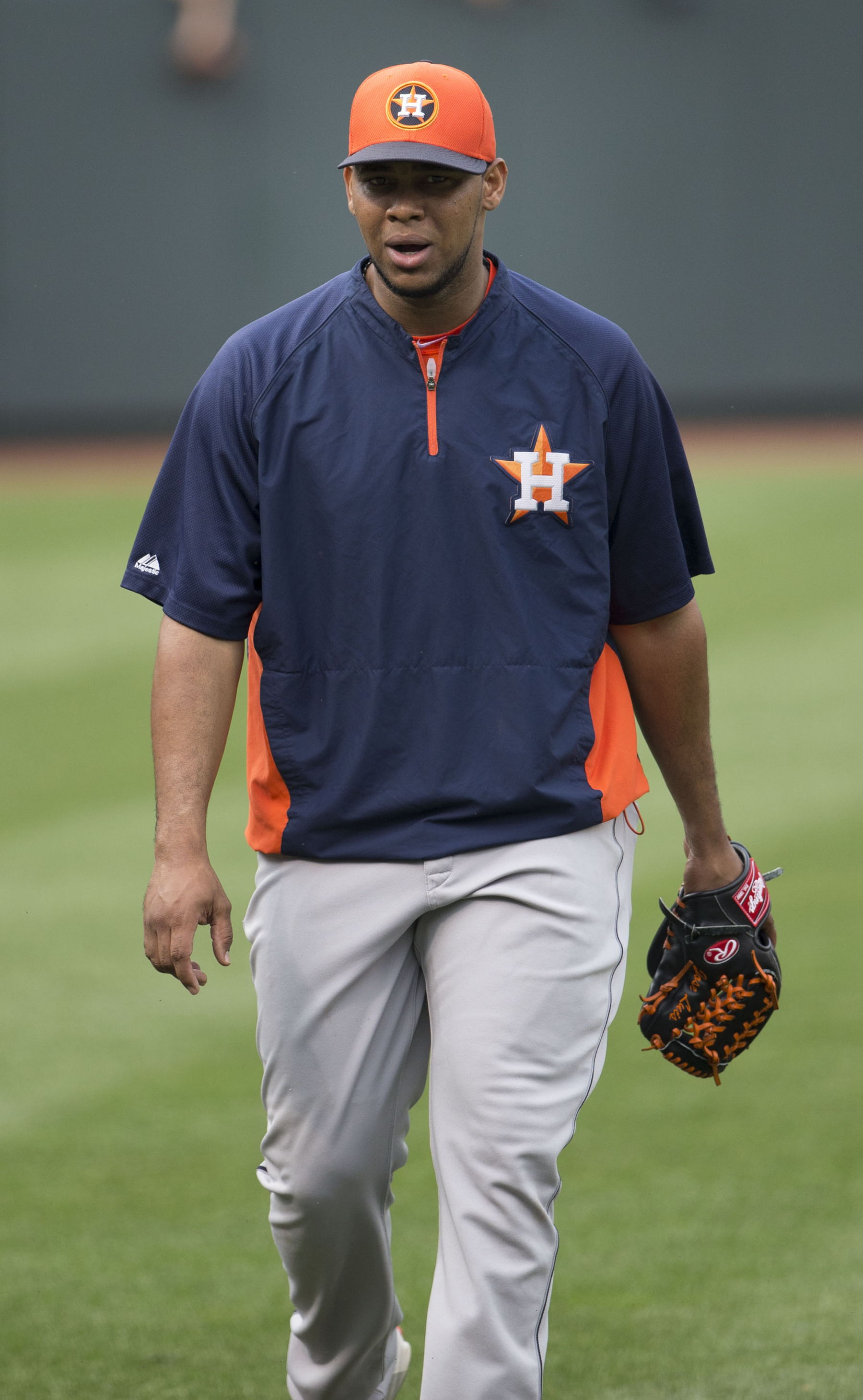 José Cisnero